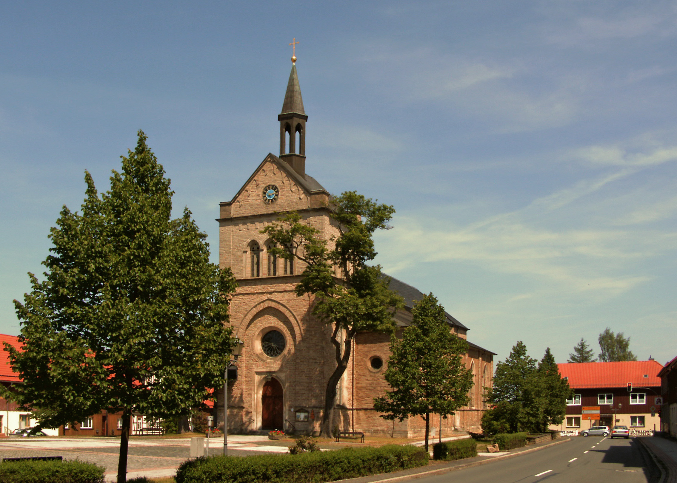 Evangelische Kirche in Hasselfelde, Landkreis Harz